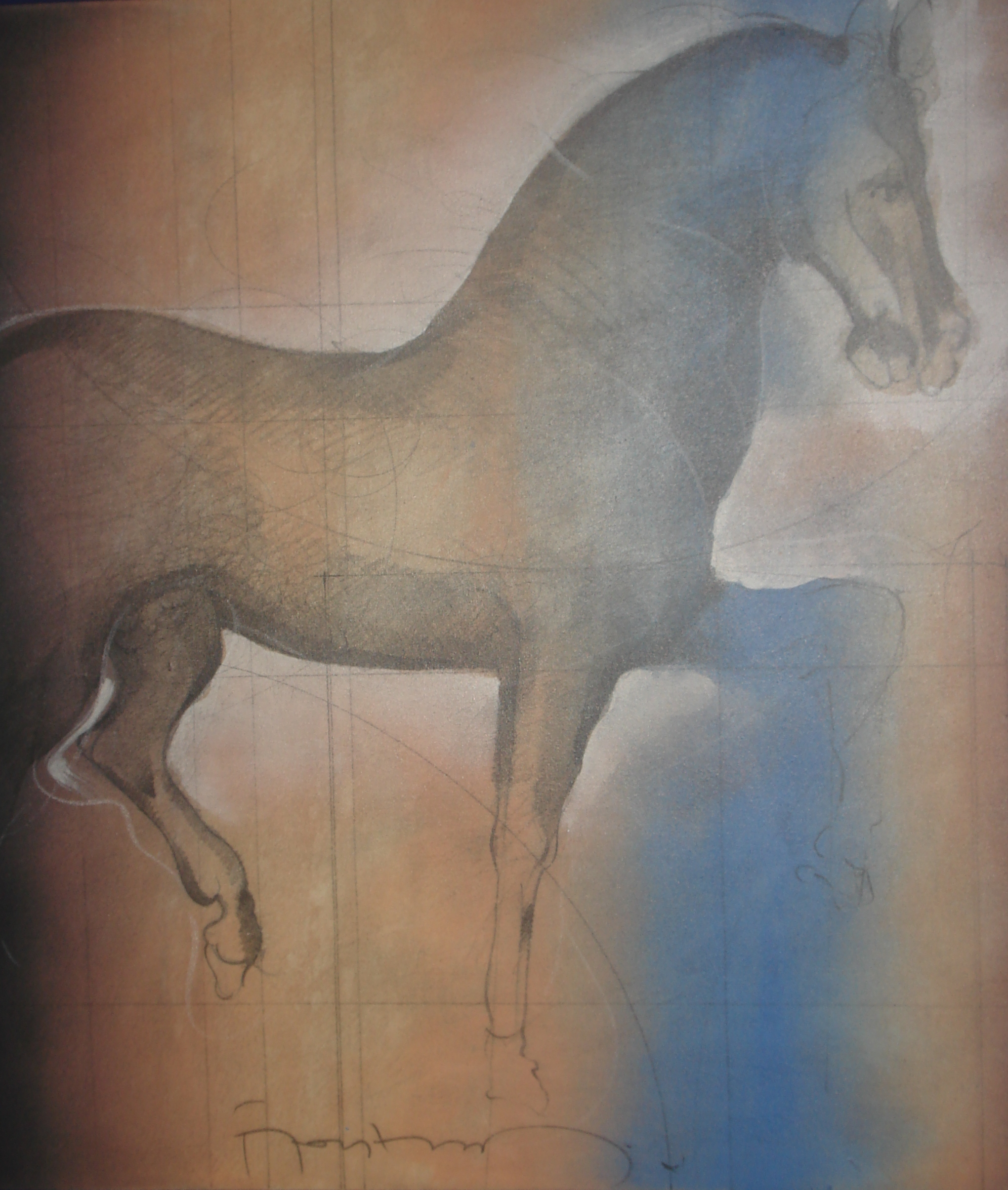 Obra Toranzos